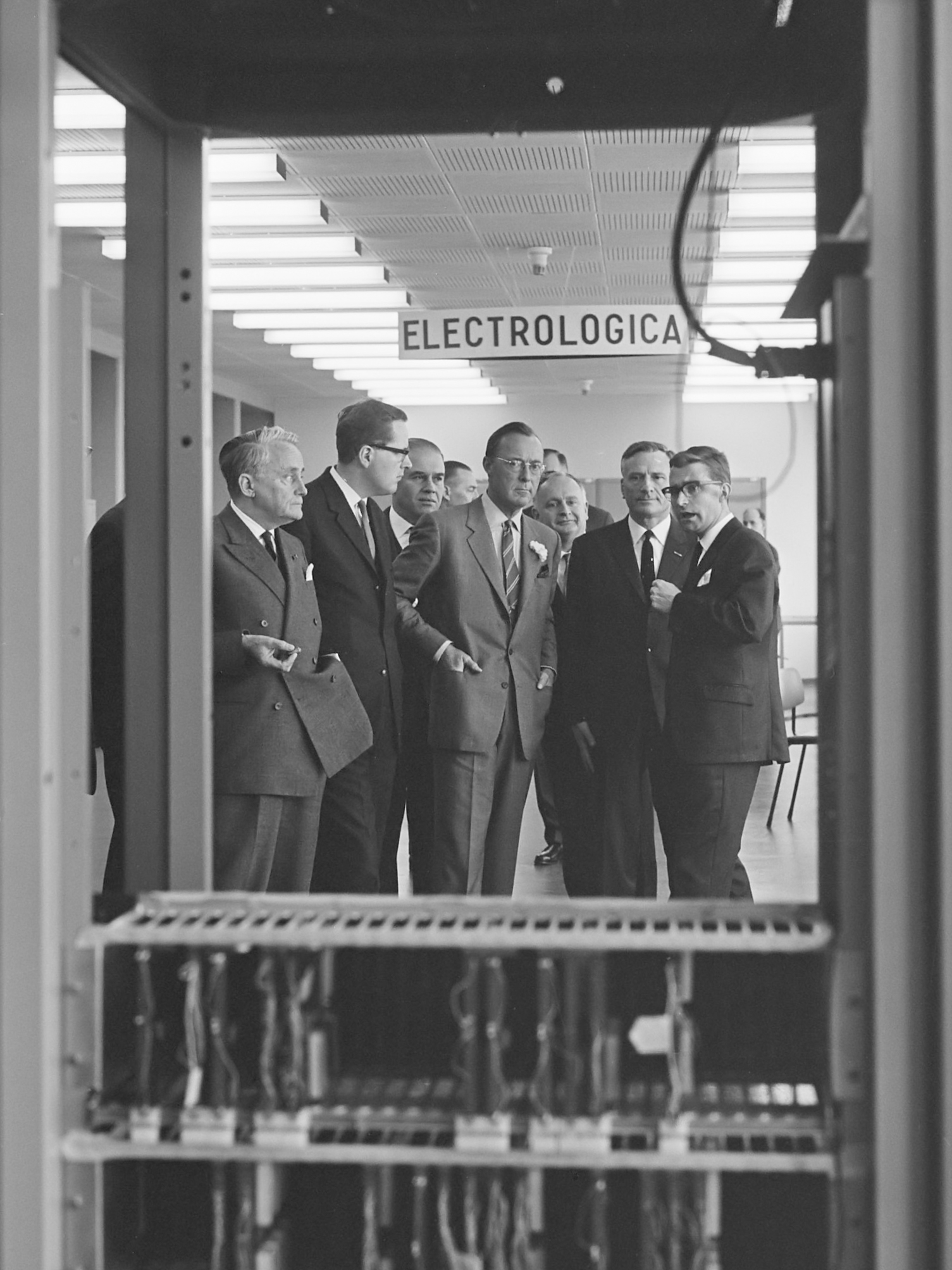 Prins Bernhard opende computerfabriek te Rijswijk, de Prins tijdens rondgang 28 november 1964